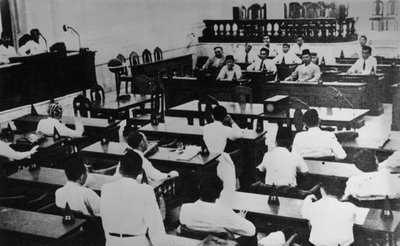 Sidang Resmi Kedua "Badan Penyelidik Usaha Persiapan Kemerdekaan Indonesia" (BPUPKI).